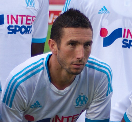 Morgan Amalfitano en 2013